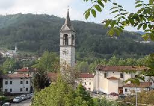 Paese dove nacque Pio Penzo